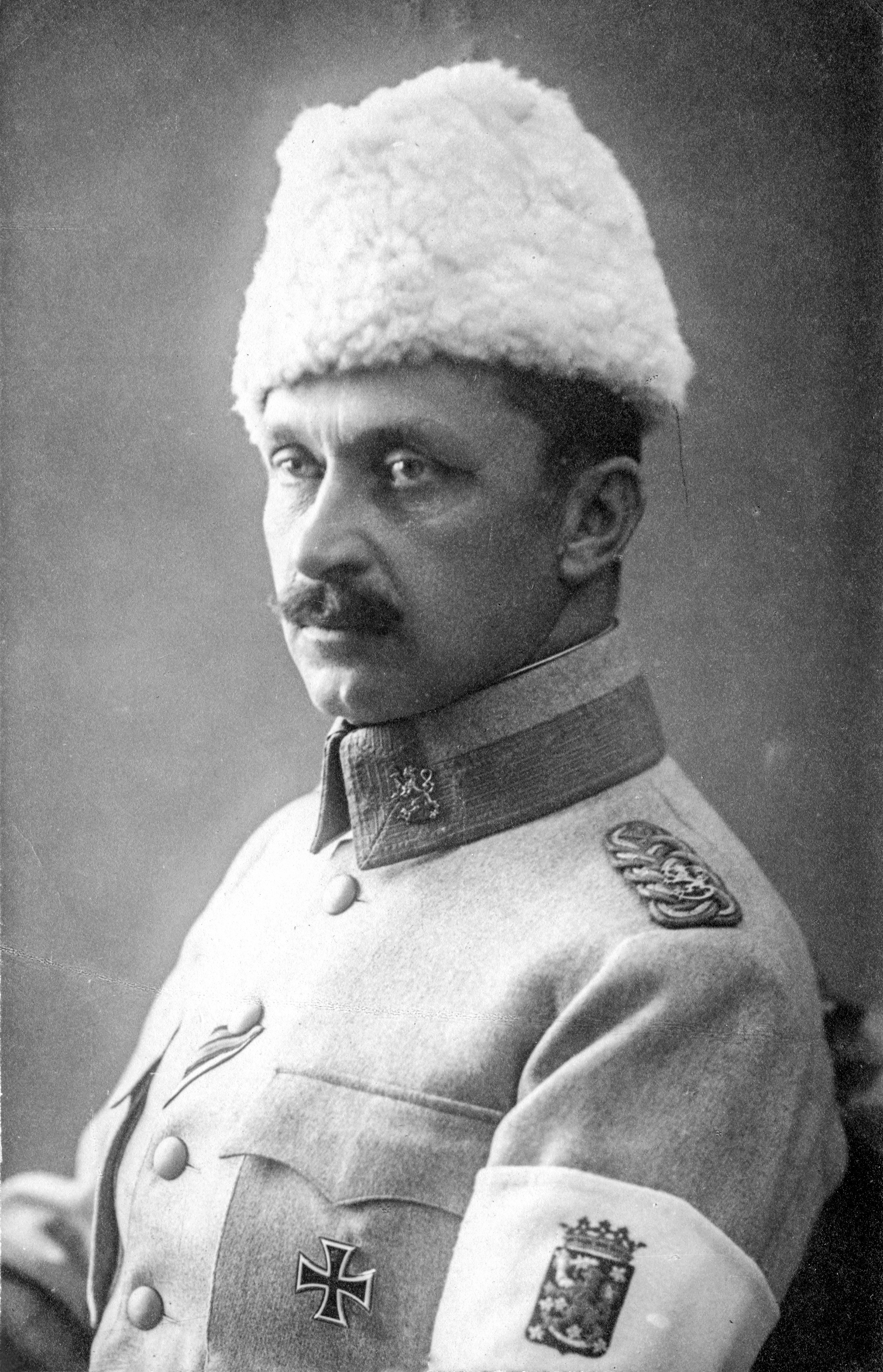 Kuvassa Mannerheim esiintyy asussa, jota hän käytti vapaussodan voitonparaatissa Helsingissä 16.5.1918.